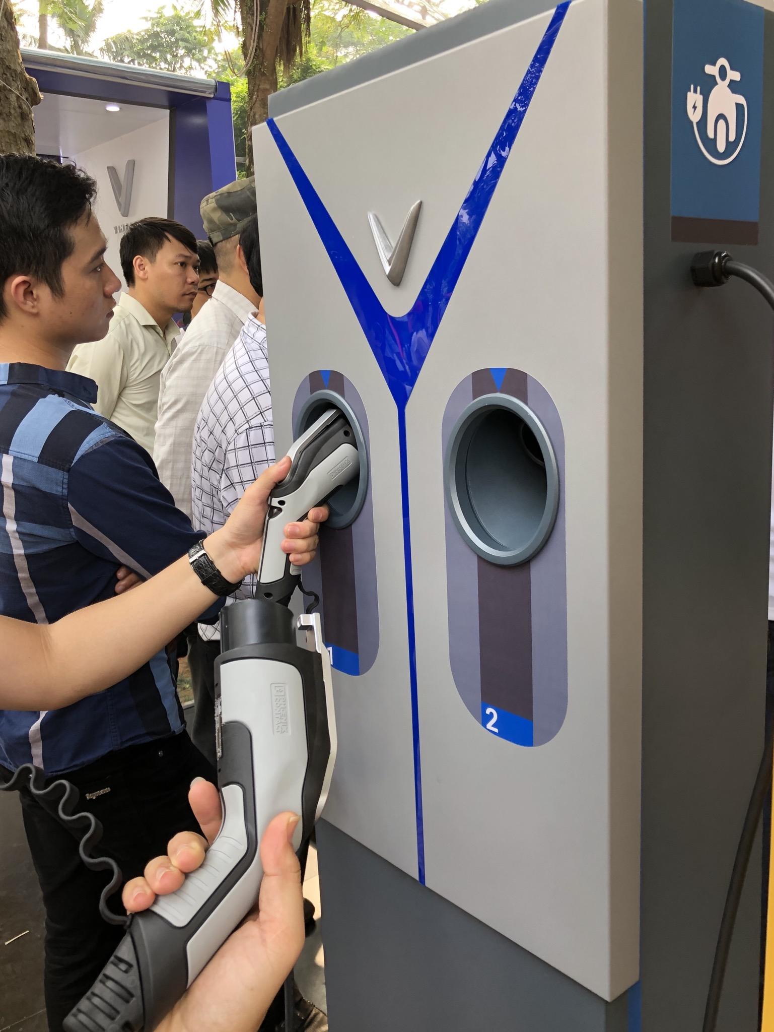 Sạc nhanh cho xe máy điện VinFast, nhãn hiệu Phoenix Contact